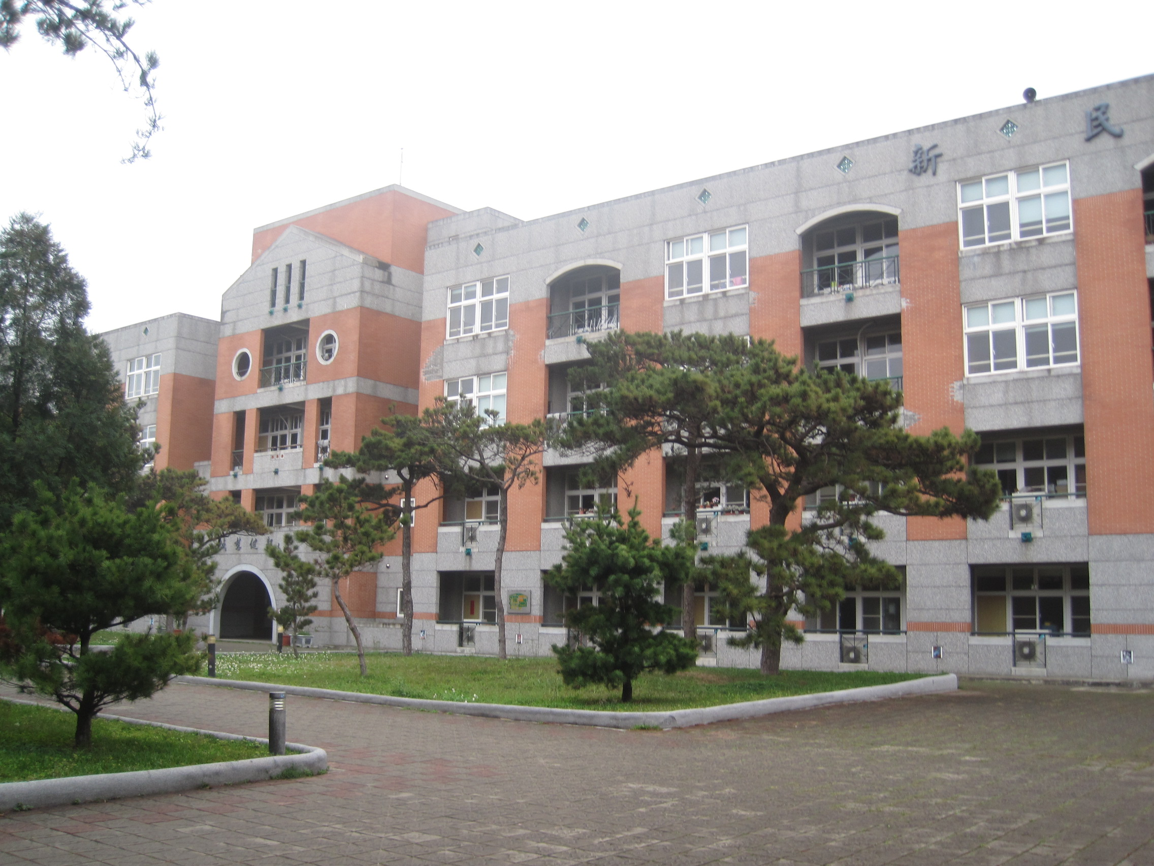 新竹高中新民樓